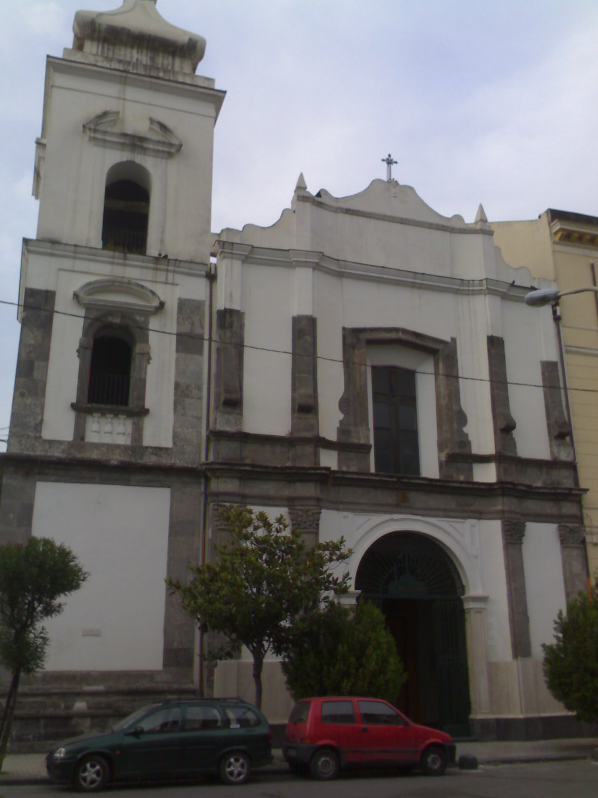 Facciata della chiesa di San Bartolomeo Apostolo di Nocera Inferiore